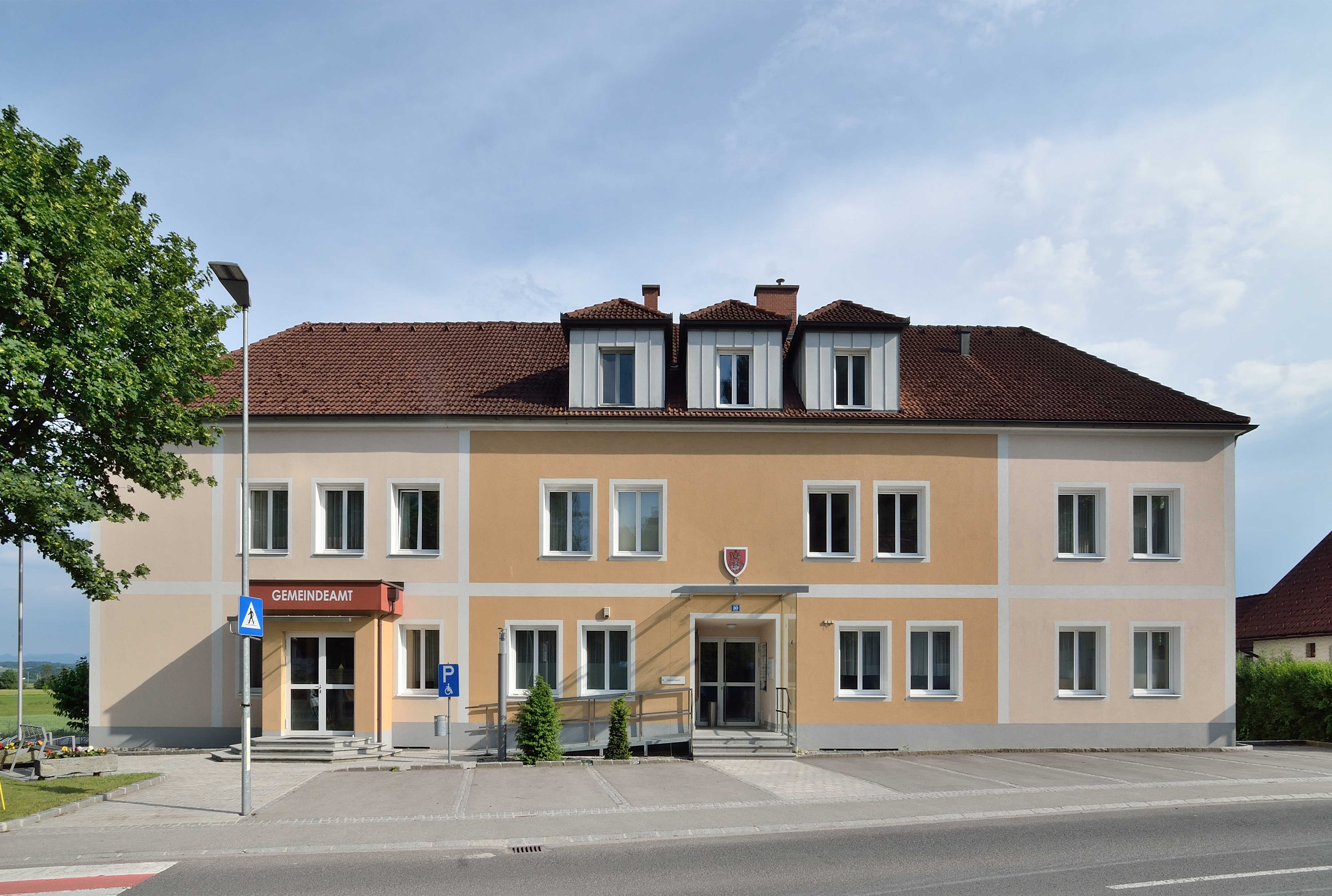 Gemeindeamt von St. Georgen am Ybbsfelde, Niederösterreich.